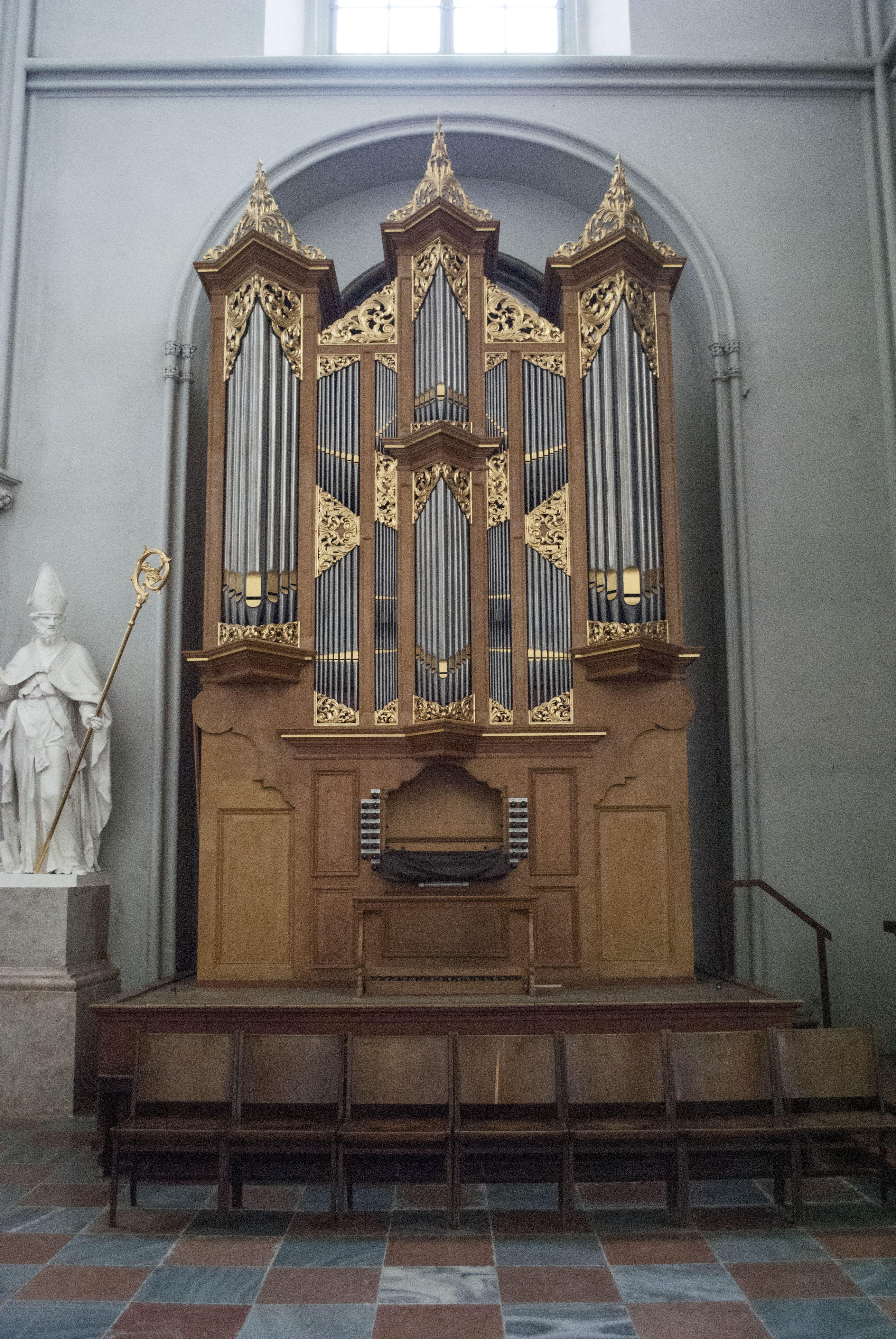 Augustinerkirche, ehem. Hofpfarrkirche hl. Augustin